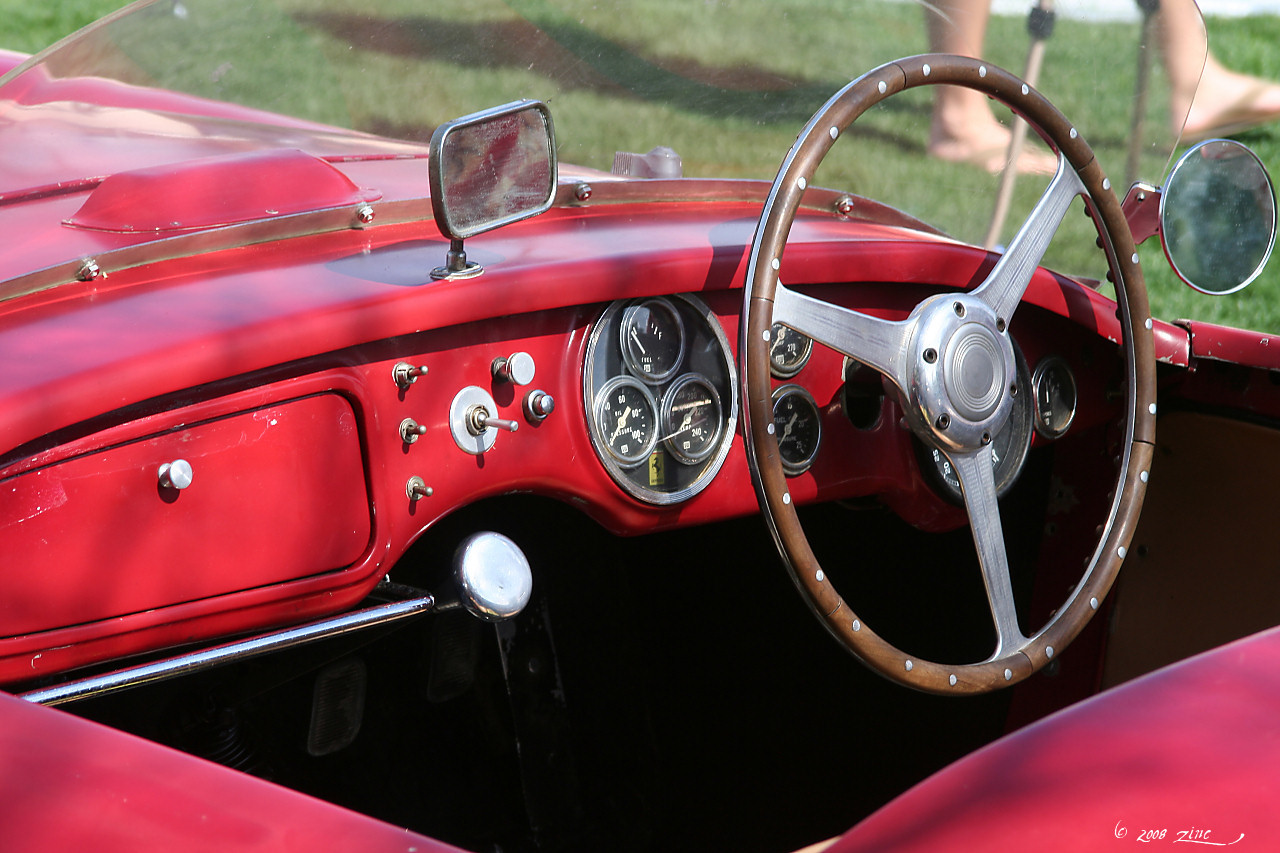 1948 Ferrari 166 MM Barchetta - chassis 01C - int